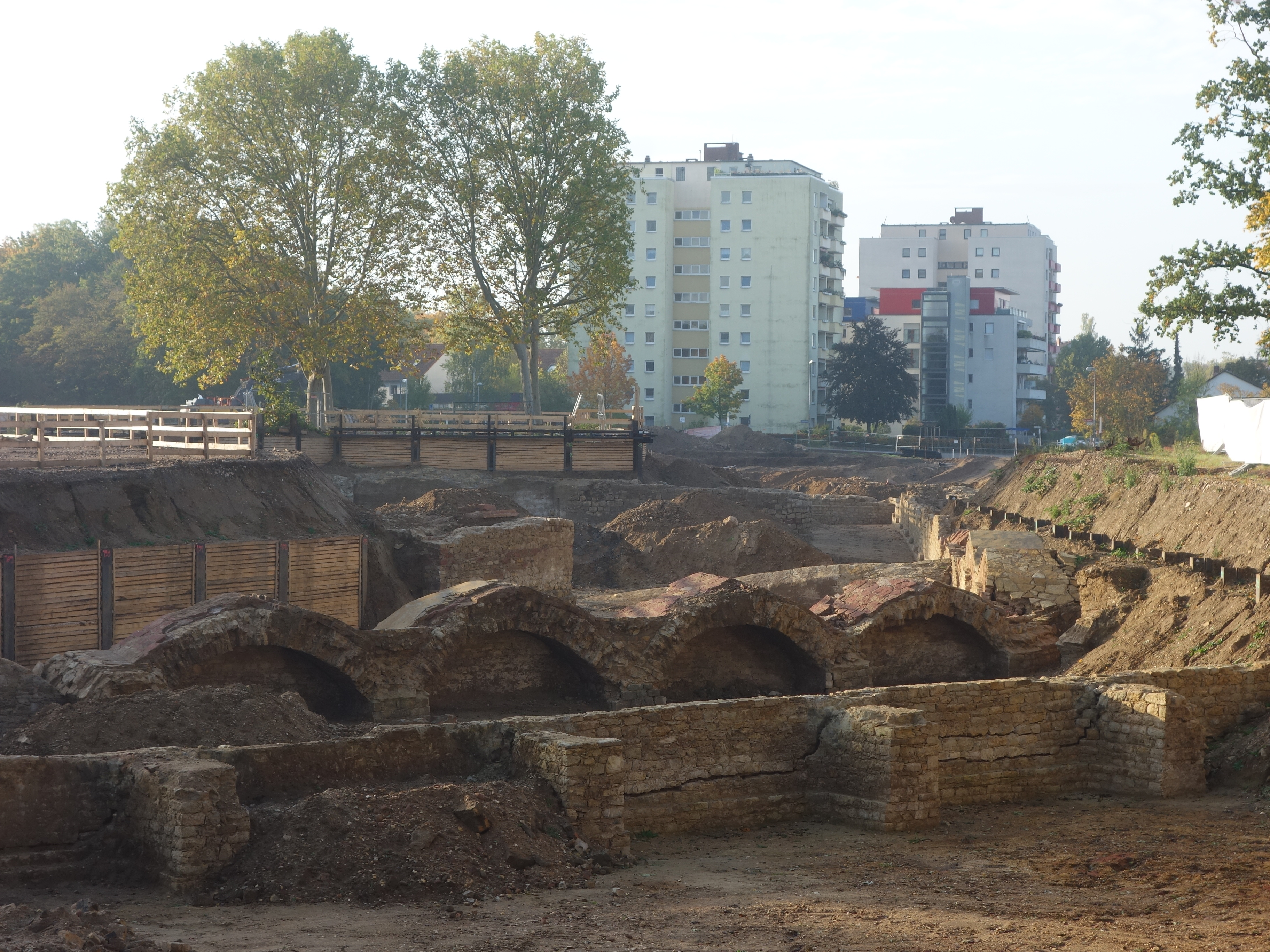 Im Mainzer Stadtteil Hartenberg-Münchfeld befanden sich mehrere Festungswerke, darunter das Fort Hartenberg. Dieses wurde kurz nach dem Ersten Weltkrieg teilweise abgerissen und Mitte der 1960er Jahre durch eine neue Grundschule und deren Sportplatz überbaut. Nachdem die Schule zugunsten einer geplanten Wohnbebauung abgerissen wurde, kamen die vorzüglich erhaltenen Überreste des Forts bei den Ausschachtungsarbeiten wieder zum Vorschein.